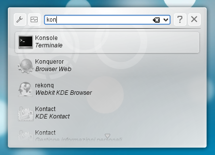 KRunner in KDE 4.3